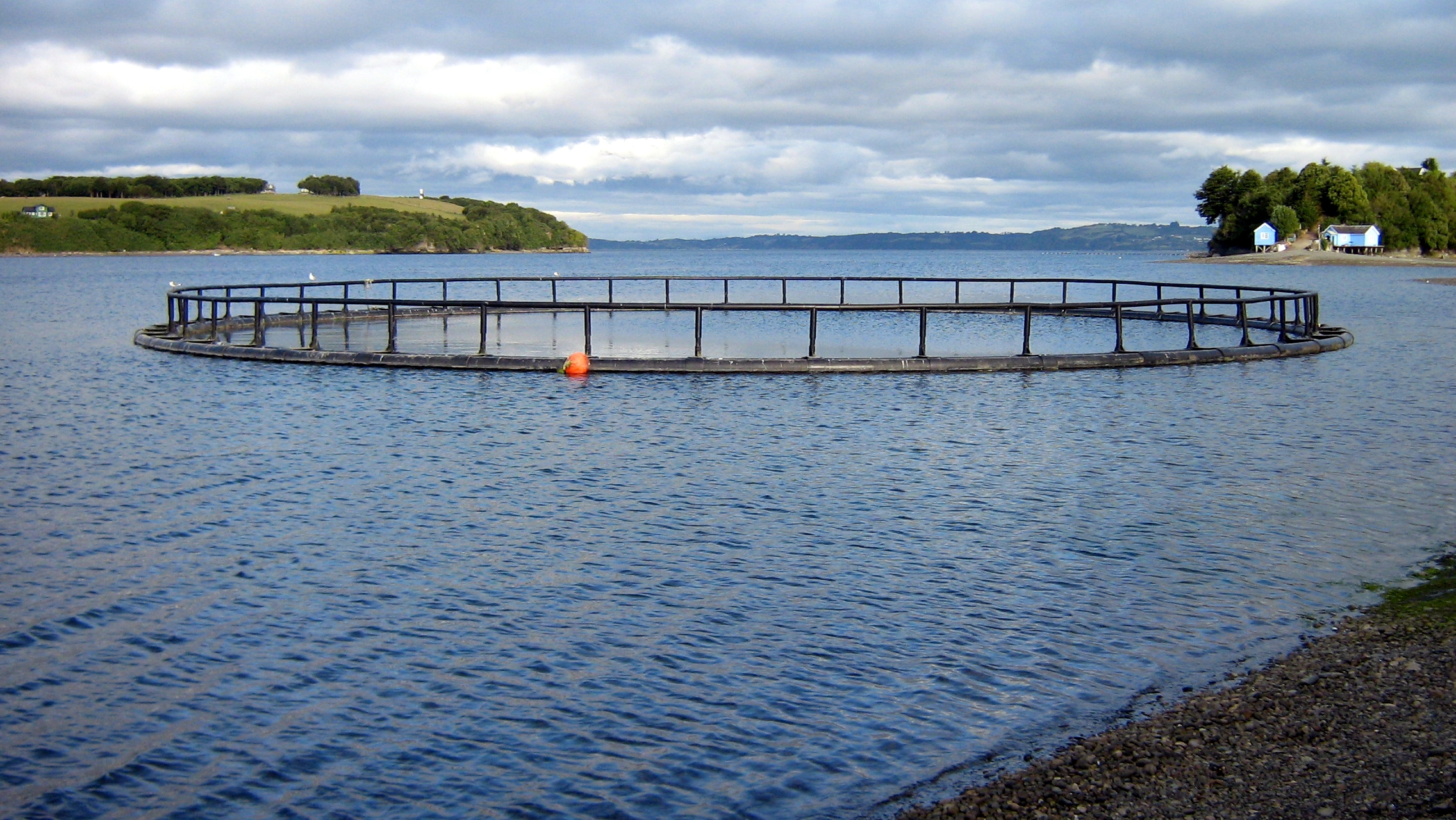 Jaula salmonera sin uso en la playa de Quinched, comuna de Chonchi, archipiélago de Chiloé, Chile.